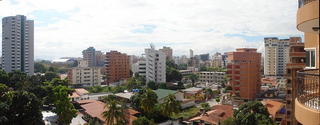 Maracay Norte. Una de las zonas más exclusivas de la Ciudad Jardín, Urb. La Soledad en Las Delicias.